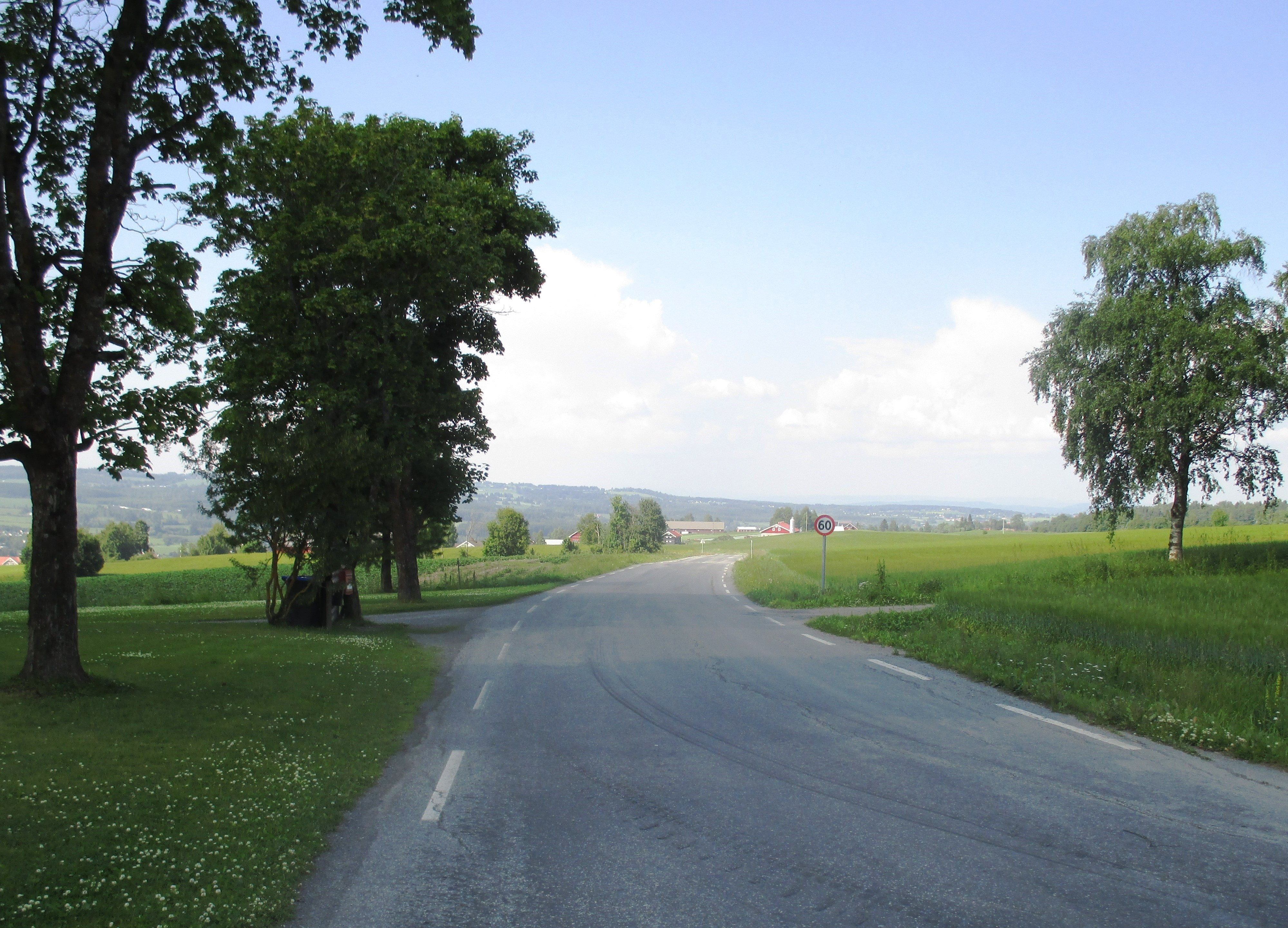 Fylkesvei 2346 (tidl. 80) ved Molstad i Østre Toten